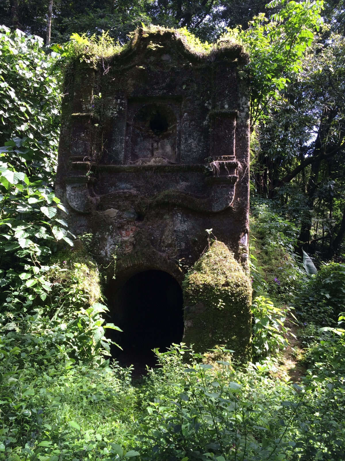 Convento, oratorio y acueducto de los Jesuitas en Fraijanes, Guatemala.